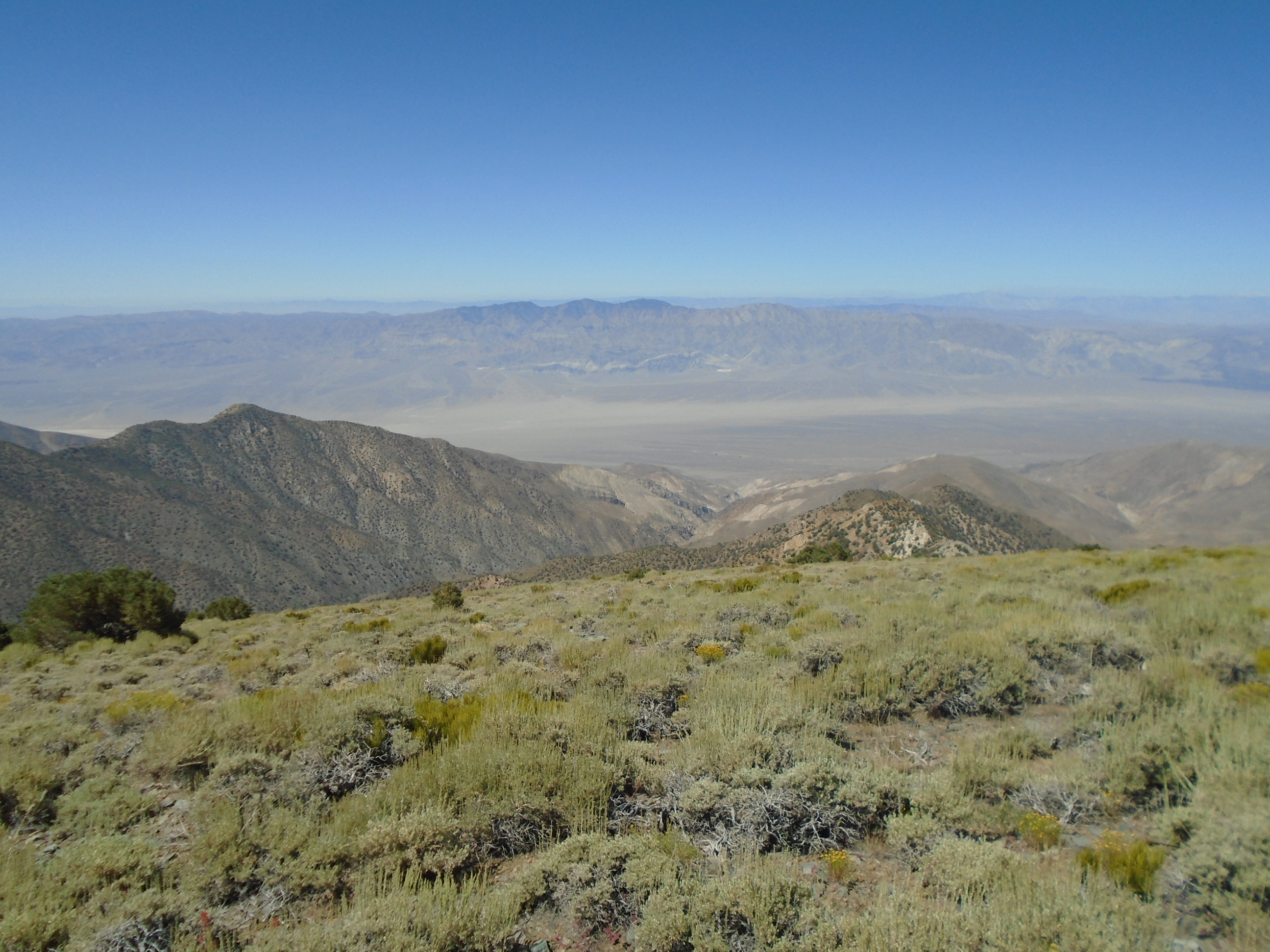 Údolí Panamint Valley a pohoří Argus Range z hory Telescope Peak